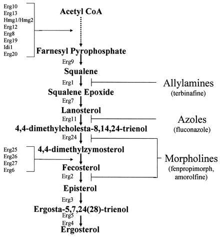 taula